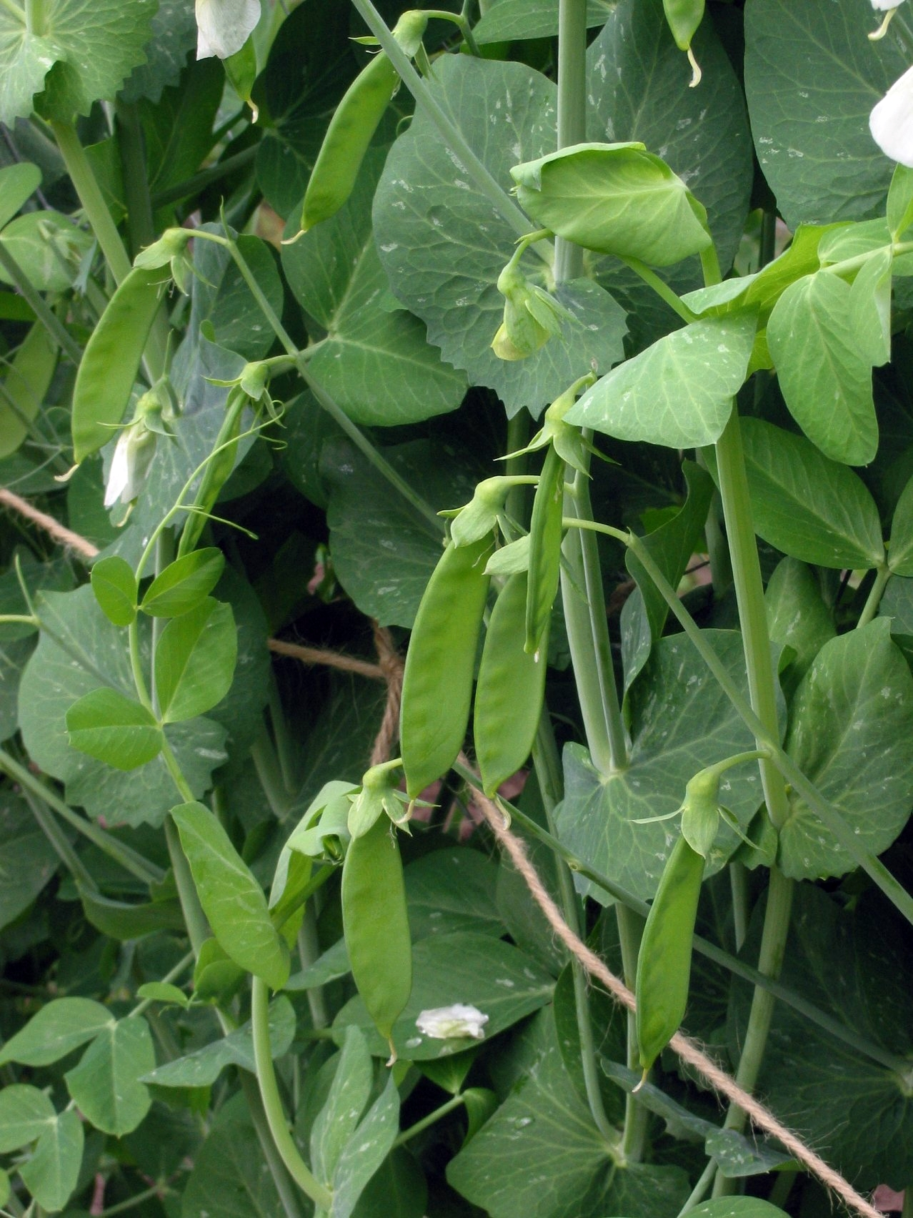 (Peultjes) Pisum sativum mange-tout